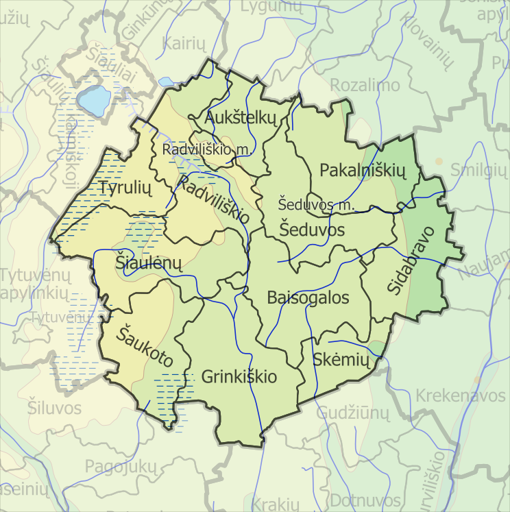 Padaryta iš :image:LietuvosSeniunijos.png